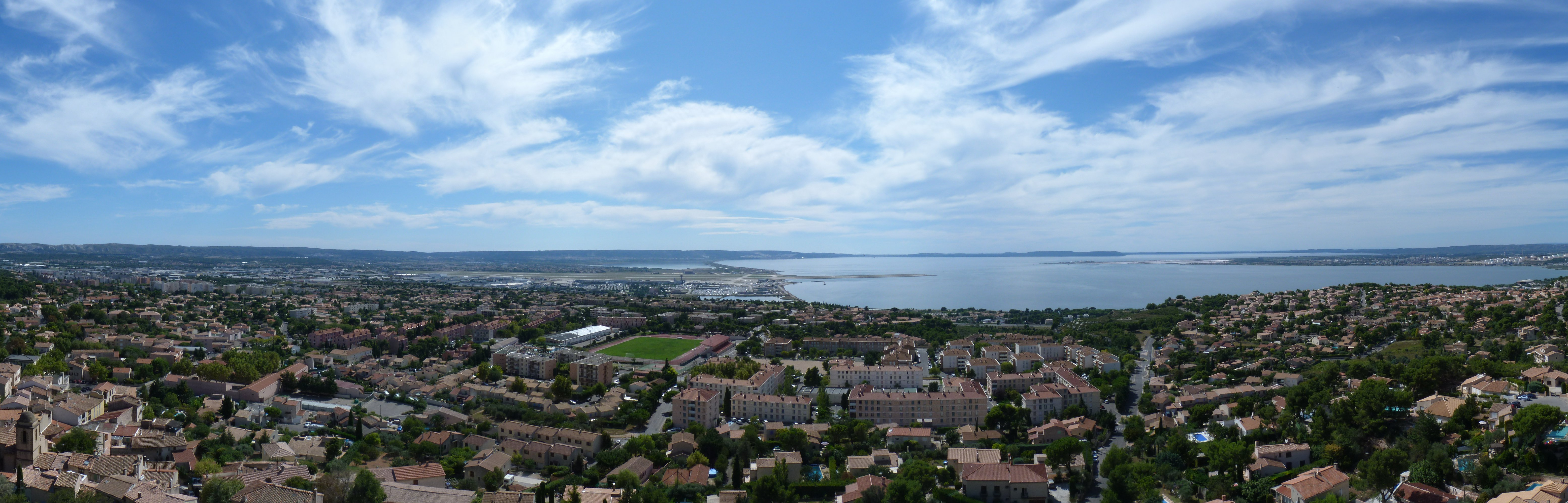 Panorama de Vitrolles effectué depuis le rocher.